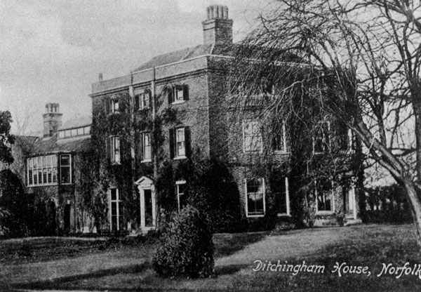 Усадьба Хаггардов в Норфолке